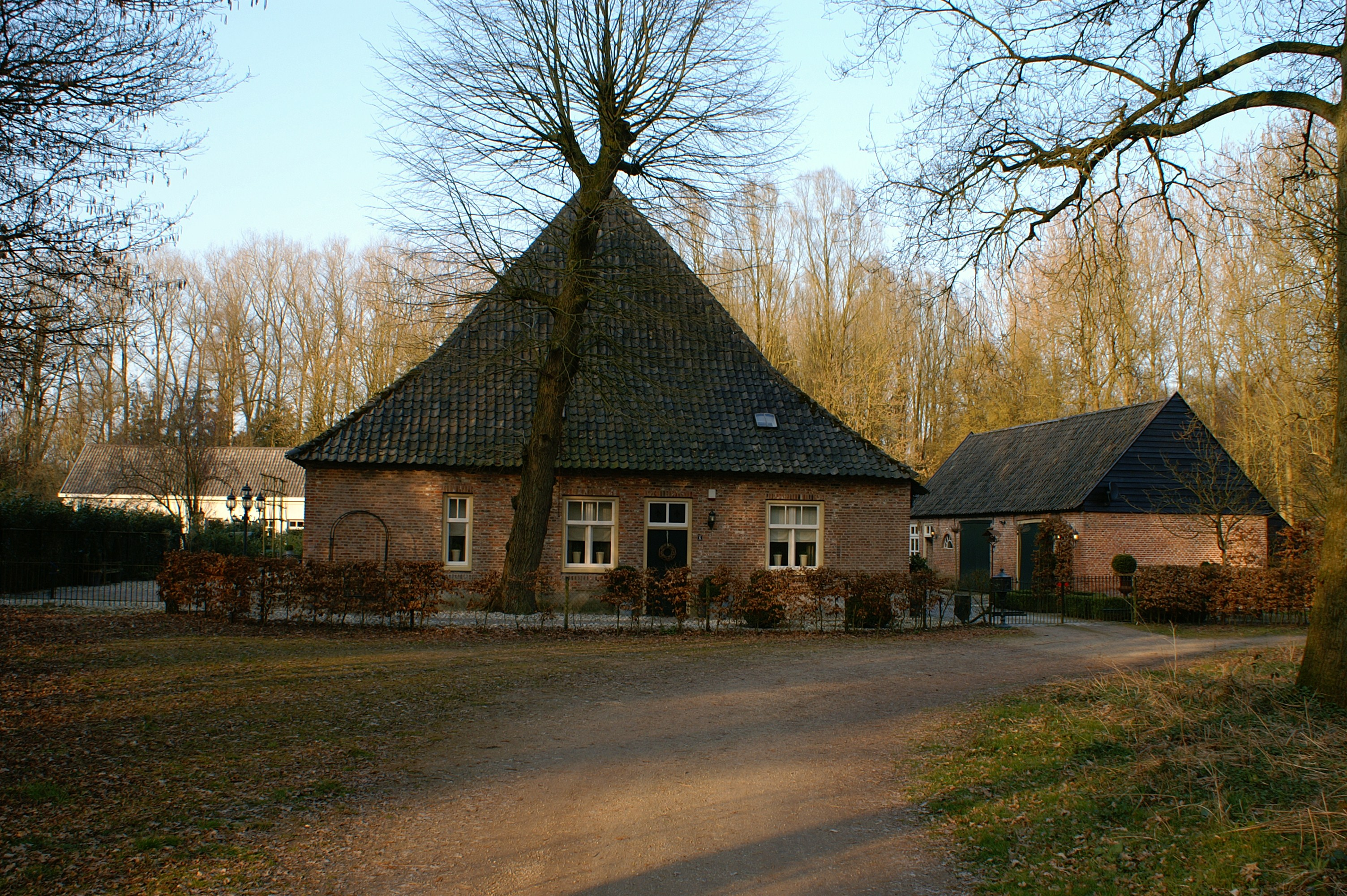 De hoeve behorende bij het huis Heerenbeek op het gelijknamige landgoed.